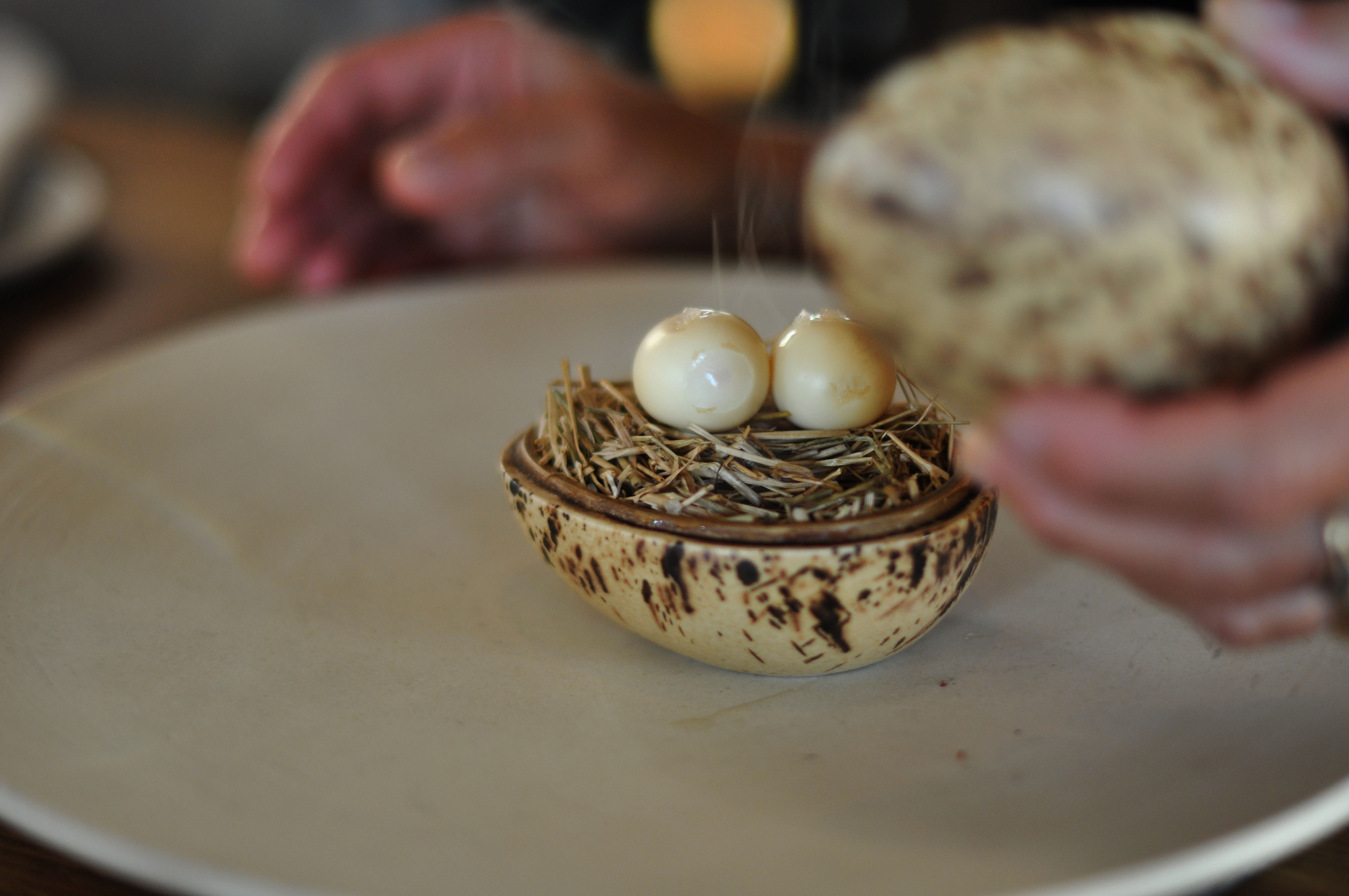 Restaurant Noma: Syltede og røgede vagtelæg (Pickled and smoked quail eggs)